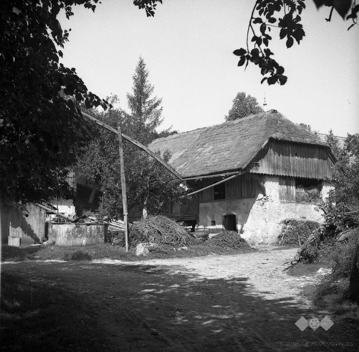 Pod in "štirna" (vodnjak), pri Mesan, Velike Pece.